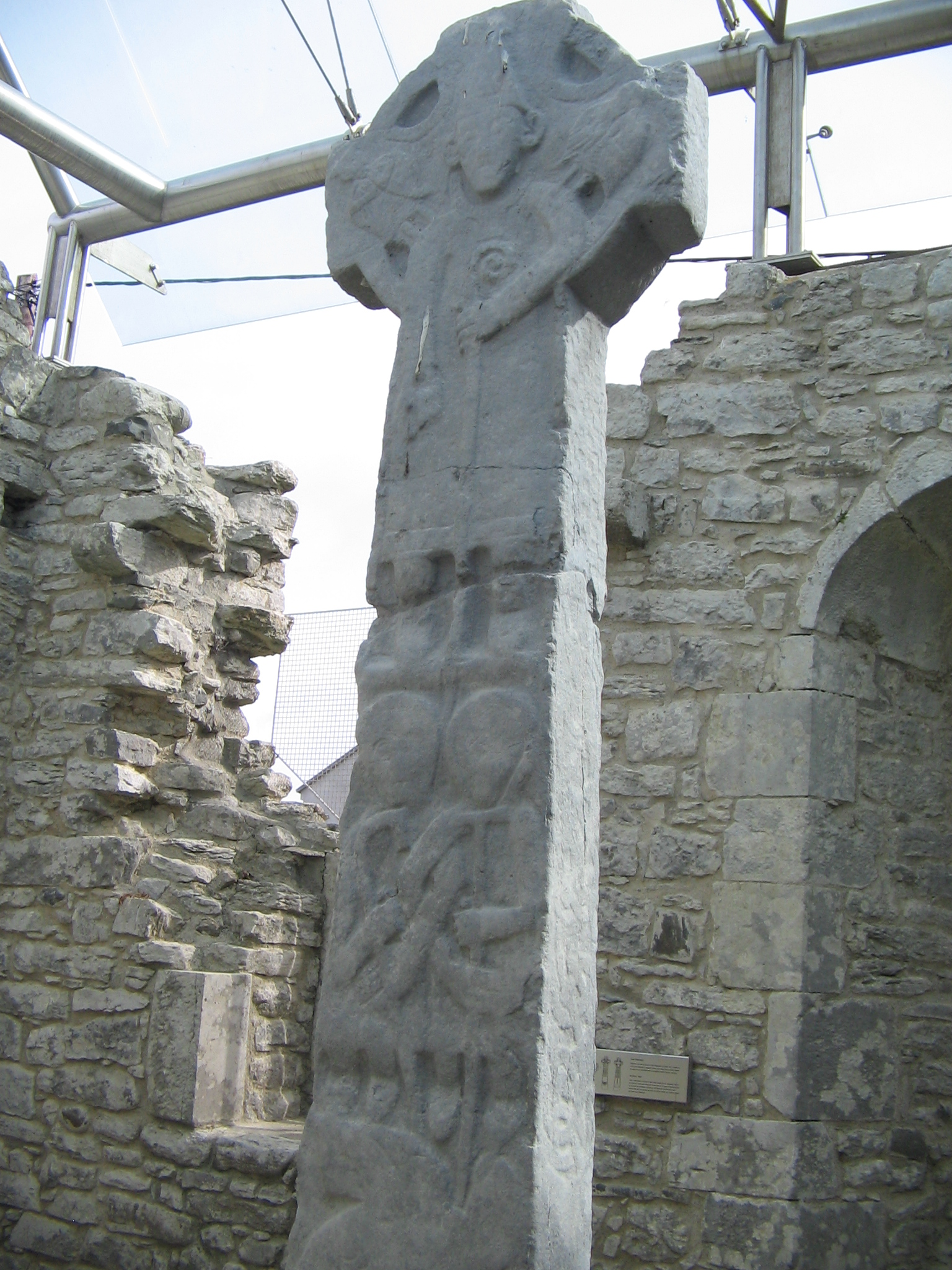 Beschreibung: Hochkreuz in Kilfenora Cathedral Quelle: selbst fotografiert Autor: Björn Reusch Datum: 28.08.06